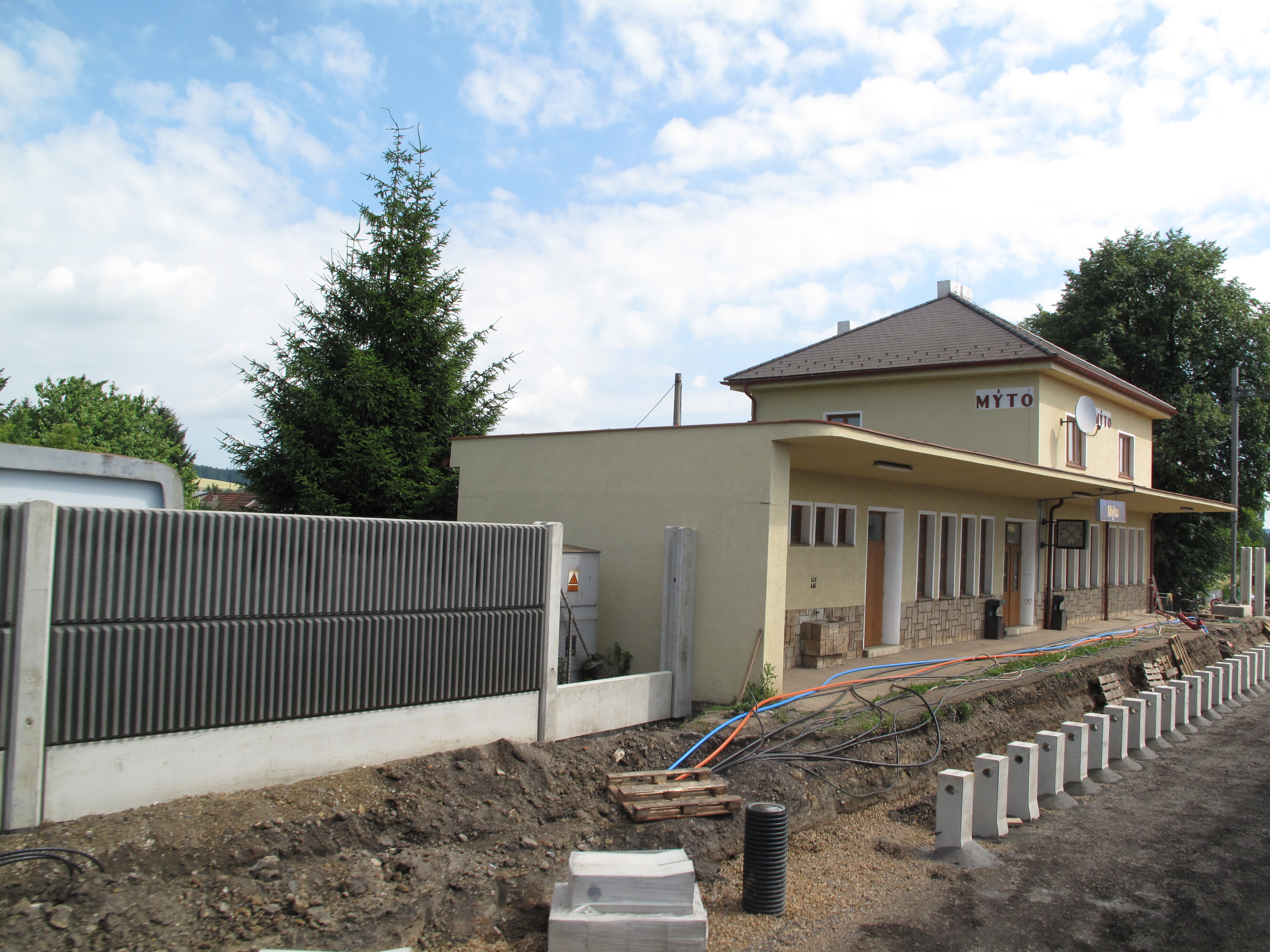 Mýto, železniční stanice